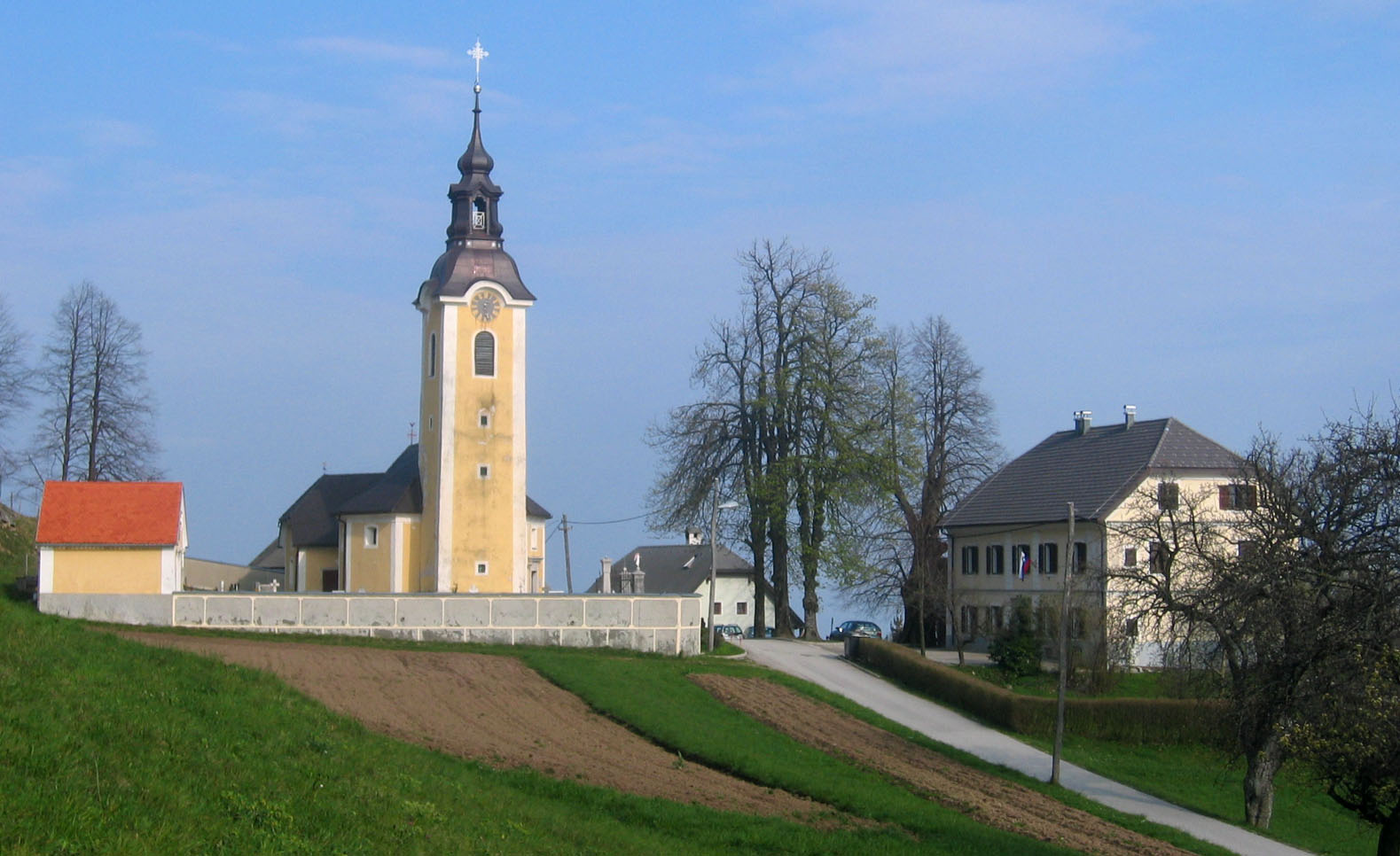 Church Katarina nad Ljubljano, (near Ljubljana), Slovenia photo:Ziga 17:13, 8 April 2007 (UTC)